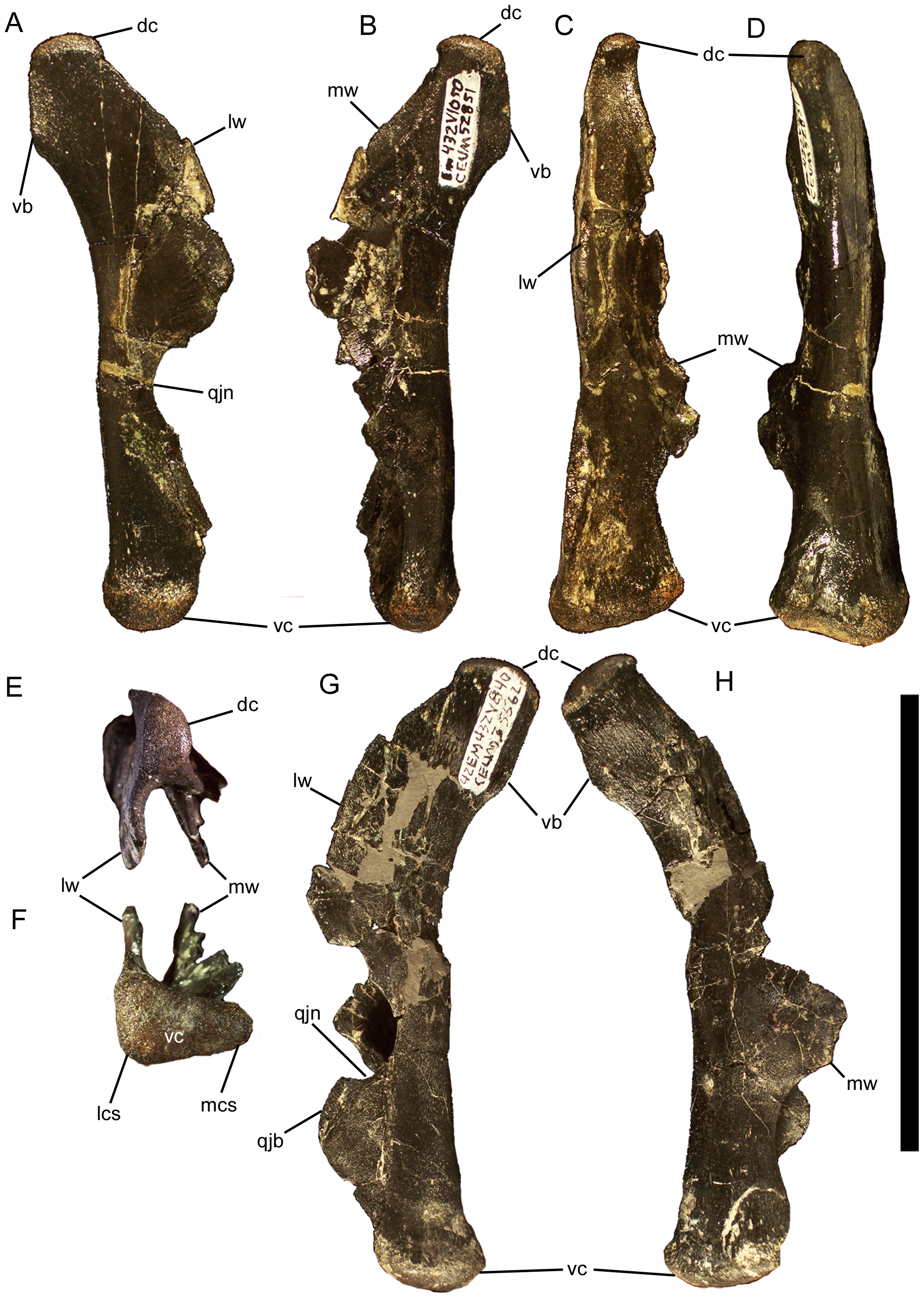 Quadrates of Eolambia. Right quadrate CEUM 52851 (Eo2) in (A) lateral, (B) medial, (C) rostral, (D) caudal, (E) dorsal, and (F) ventral views. Left quadrate CEUM 35562 (Eo2) in (G) lateral and (H) medial views. Abbreviations: dc, dorsal condyle; lcs, lateral condylar surface; lw, lateral wing; mcs, medial condylar surface; mw, medial wing; qjb, quadratojugal buttress; qjn, quadratojugal notch; vb, vertical buttress; vc, ventral condyle. Scale bar equals 10 cm.